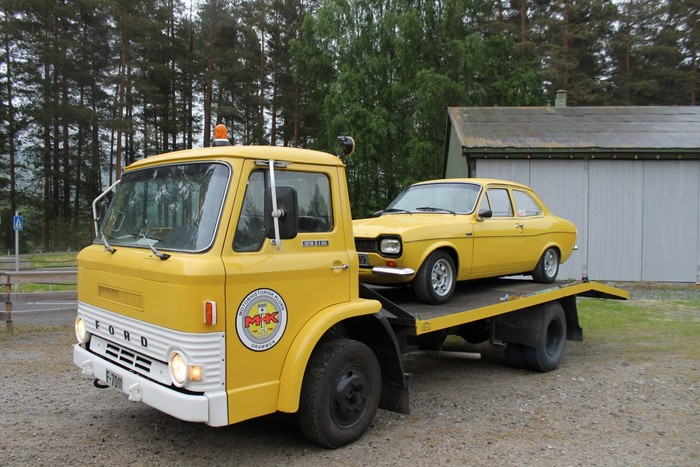 En lastebil som klubben har restaurert.